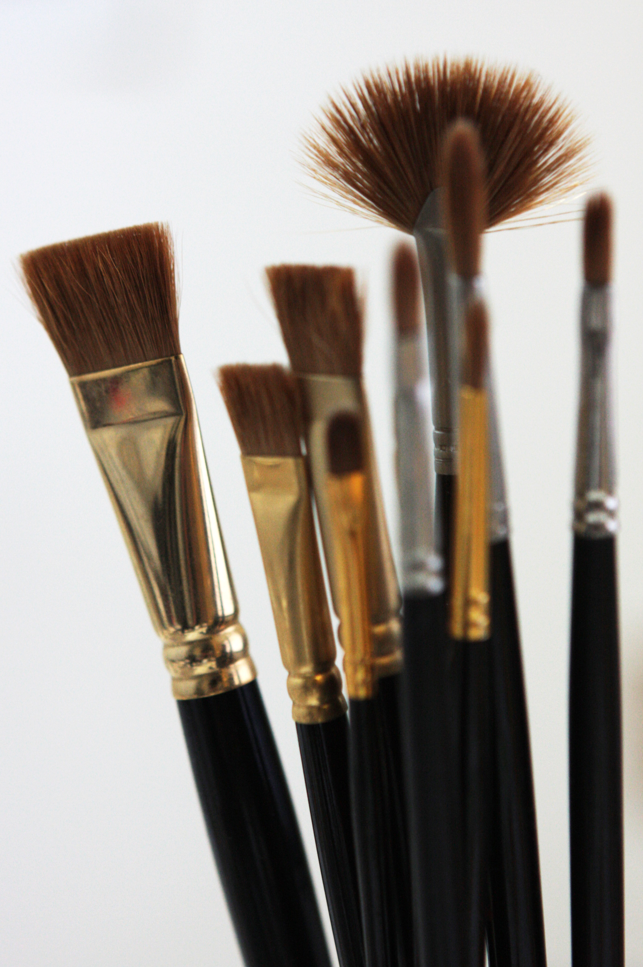 Kolinsky Sable Art Brushes